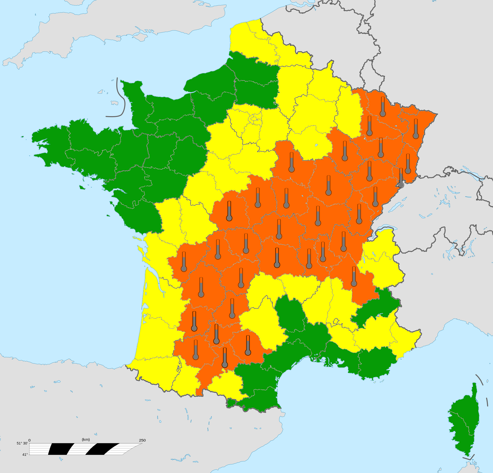 Vigilance météorologique MétéoFrance du 19 août 2012 à 6h. Alerte canicule : 33 départements en vigilance orange canicule. Diffusion : 19 août 2012 à 6h00 Validité : jusqu'au 20 août 2012 à 6h00